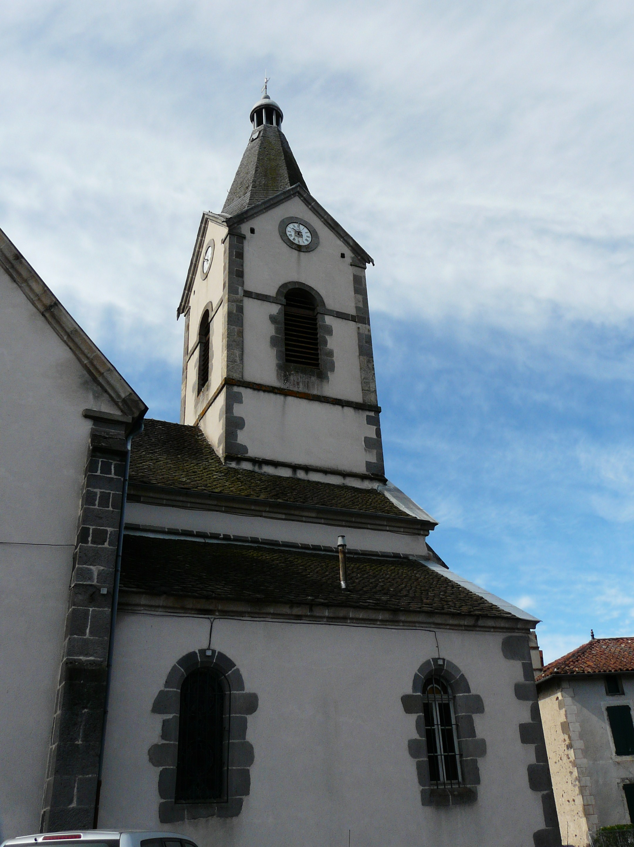 L'église de Saint-Paul-des-Landes, Cantal, France.